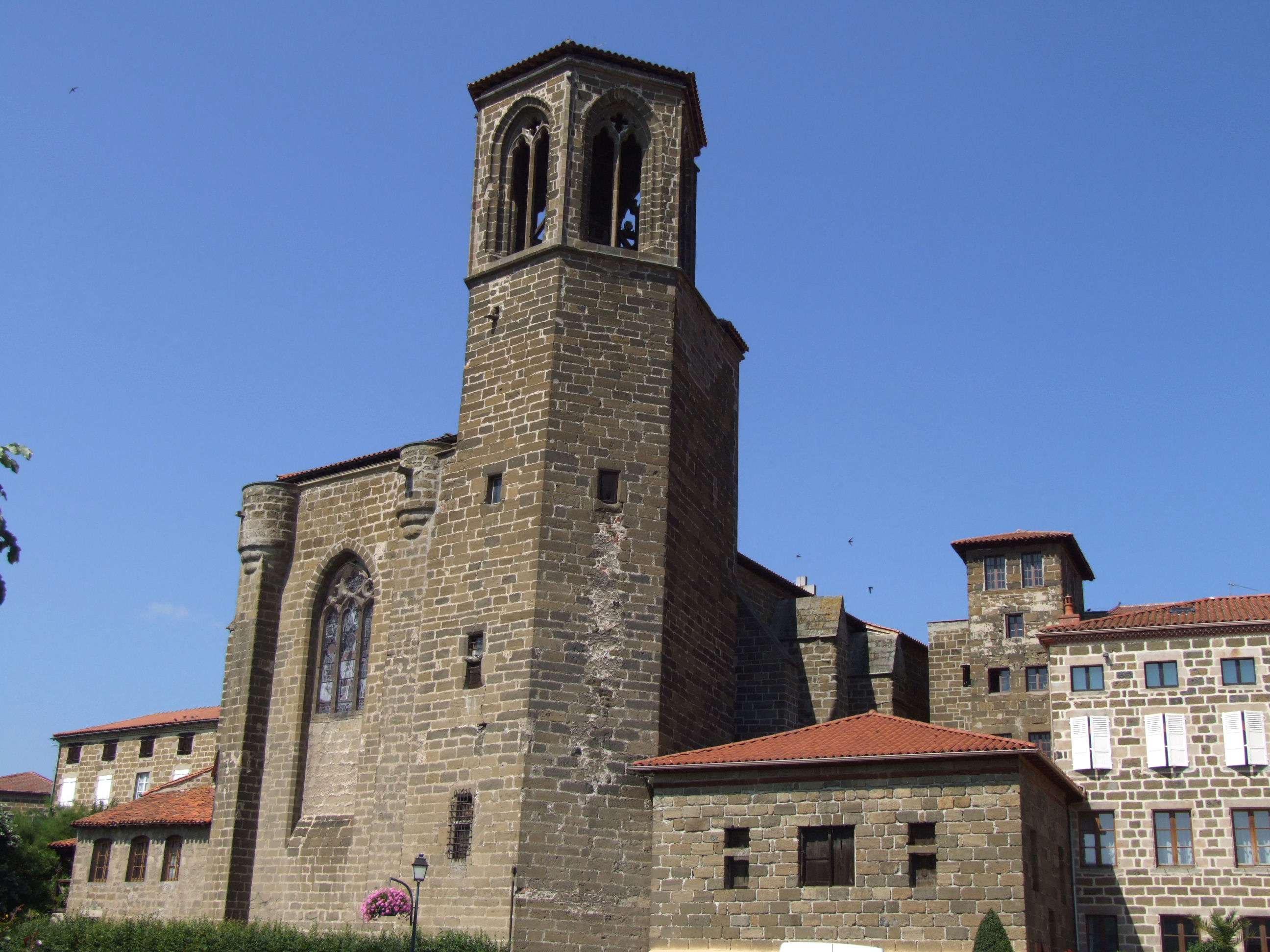 Langeac - Elise Saint-Gal vue des berges de l'Allier